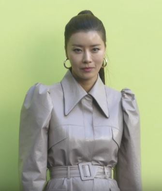 16일 오전 서울시 중구 동대문디자인플라자(DDP)에서 '2020 S/S 서울패션위크(SEOUL FASHION WEEK S/S 2020)' 까이에(CAHIERS) 김아영 디자이너의 컬렉션이 열려 유선X공현주가 참석해 포토타임을 갖고 있다.